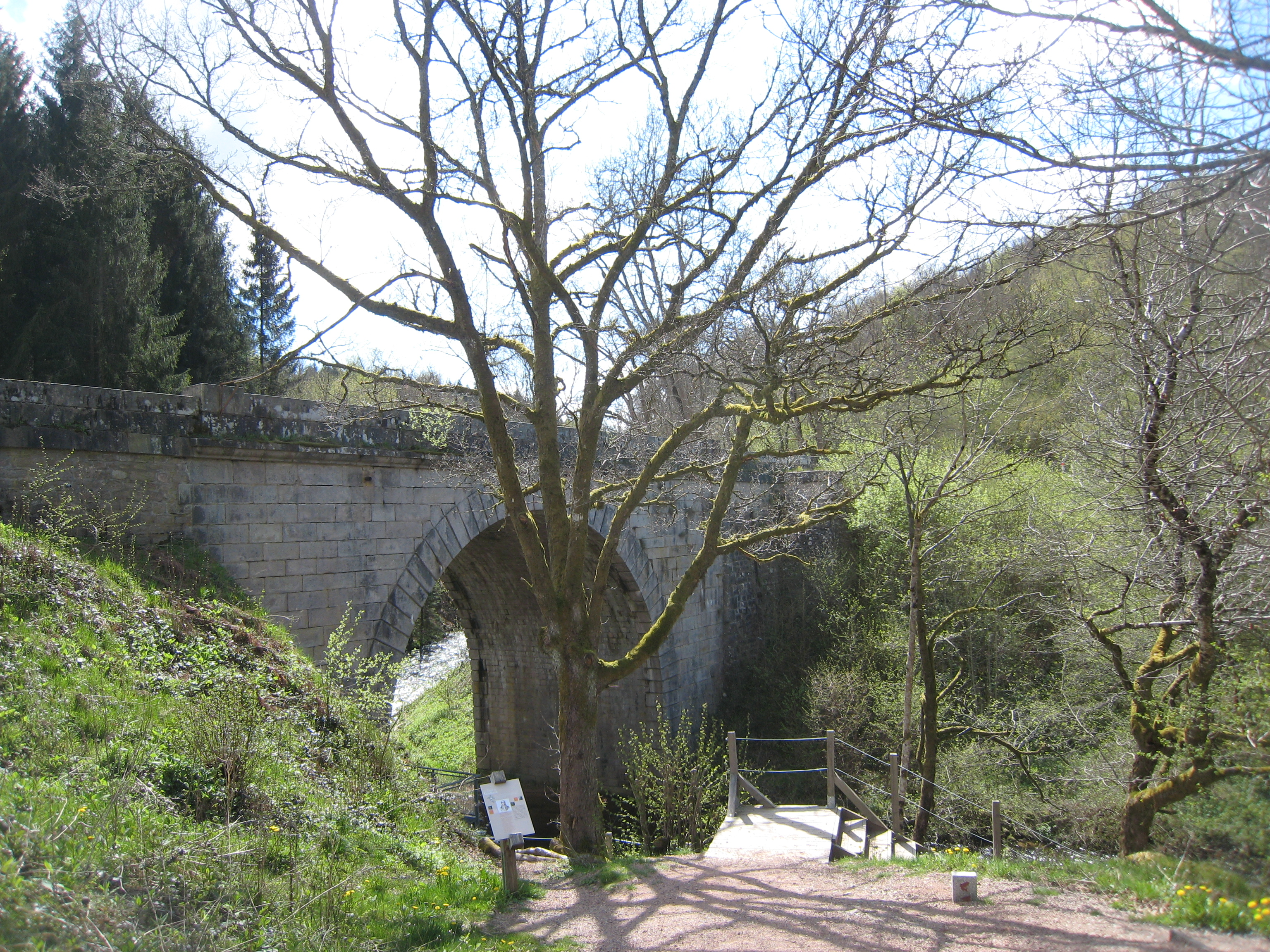 Départ du sentier du saut de Gouloux